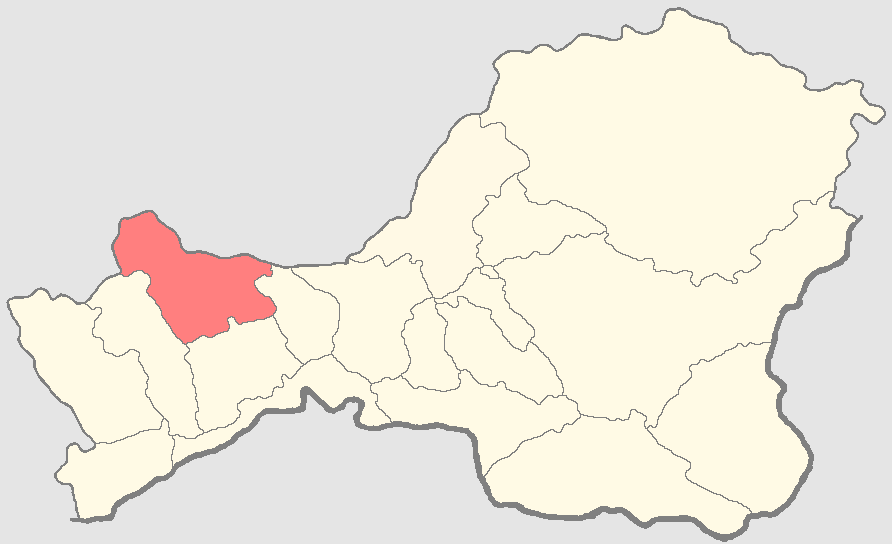 Сут-Хольский кожуун на карте Тывы